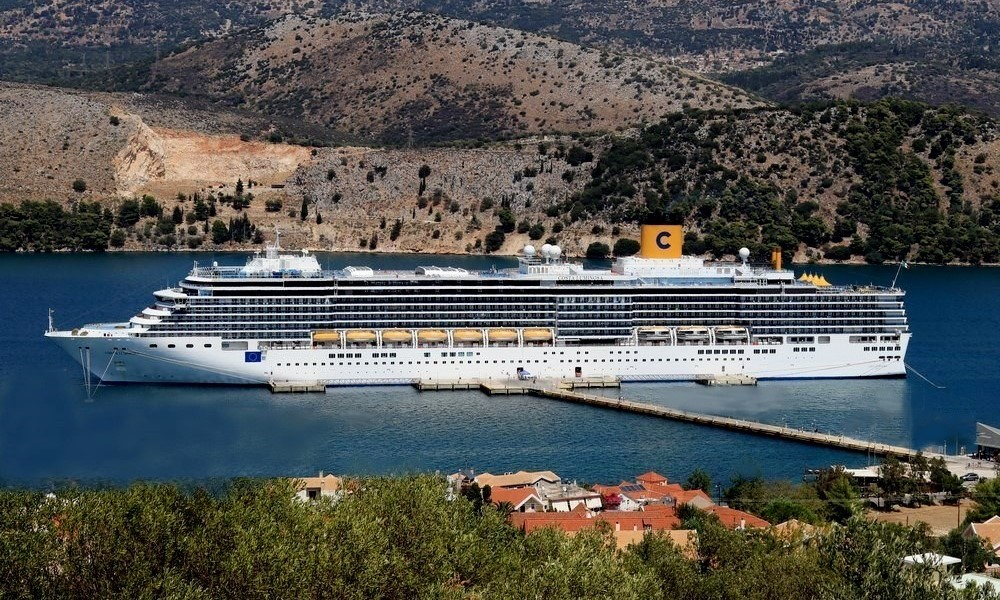 Costa Luminosa in Argostoli